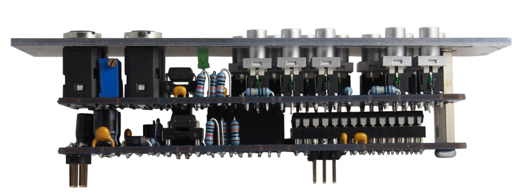 Penrose DIY eurorack quantizer